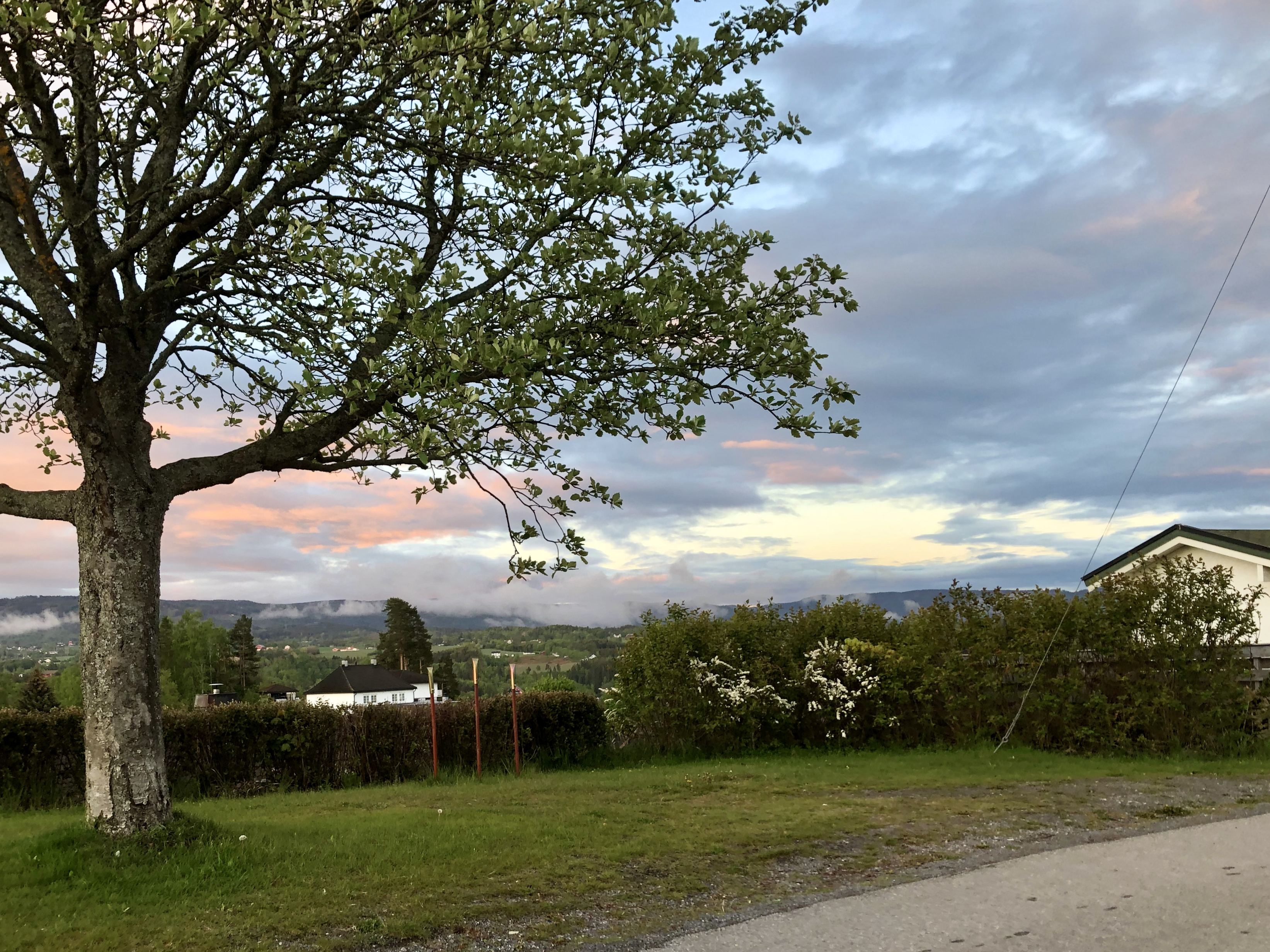 Plassen der "Teltmannen" forlot teltet sitt i Hønefoss i 2010."Teltmannen" var en forsvinningssak, der et telt ble funnet forlatt, med flere eiendeler og turutstyr. Saken ble løst ved hjelp av TV-serien "Åsted Norge" i 2020.